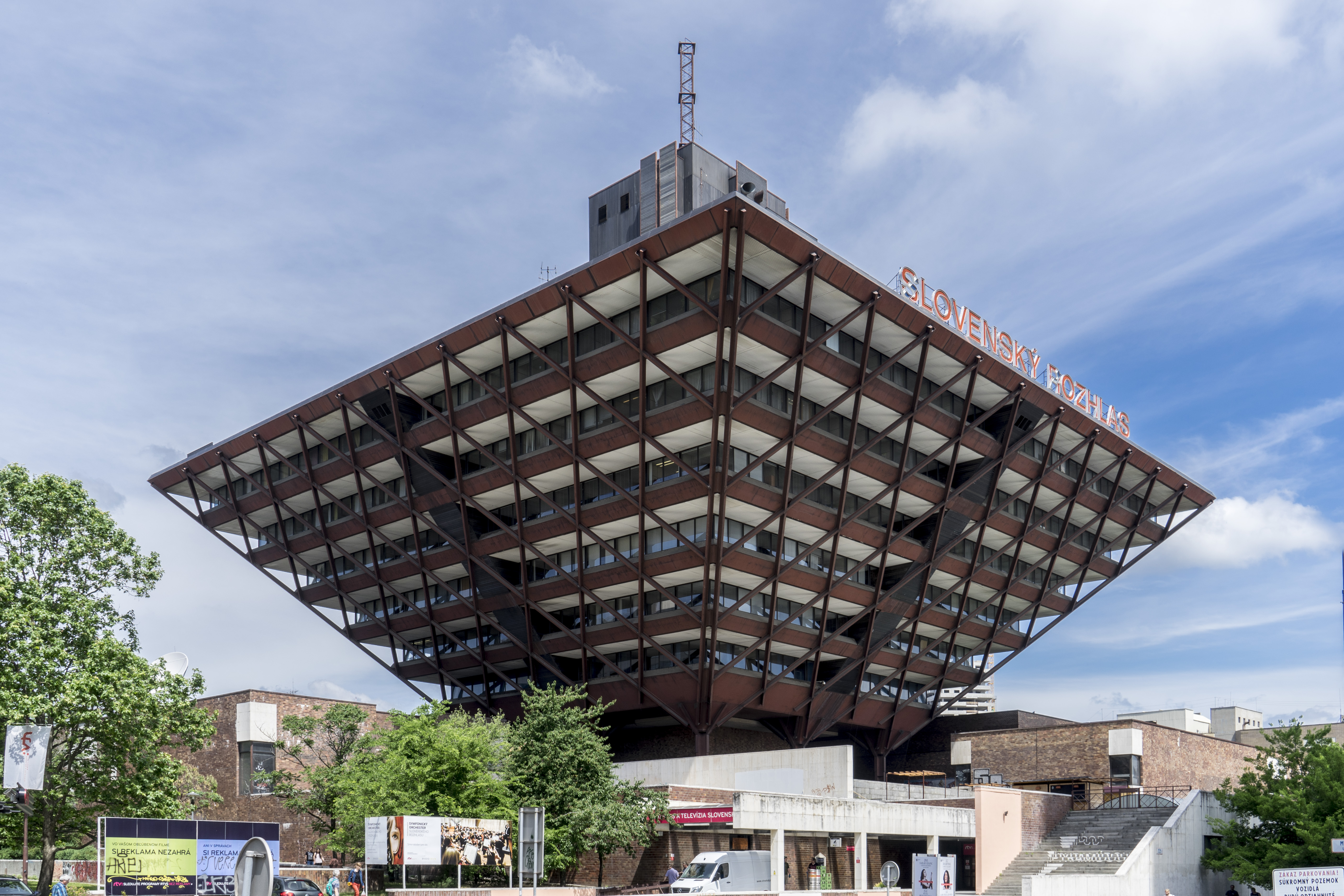 Upside down Pyramid, Bratislava